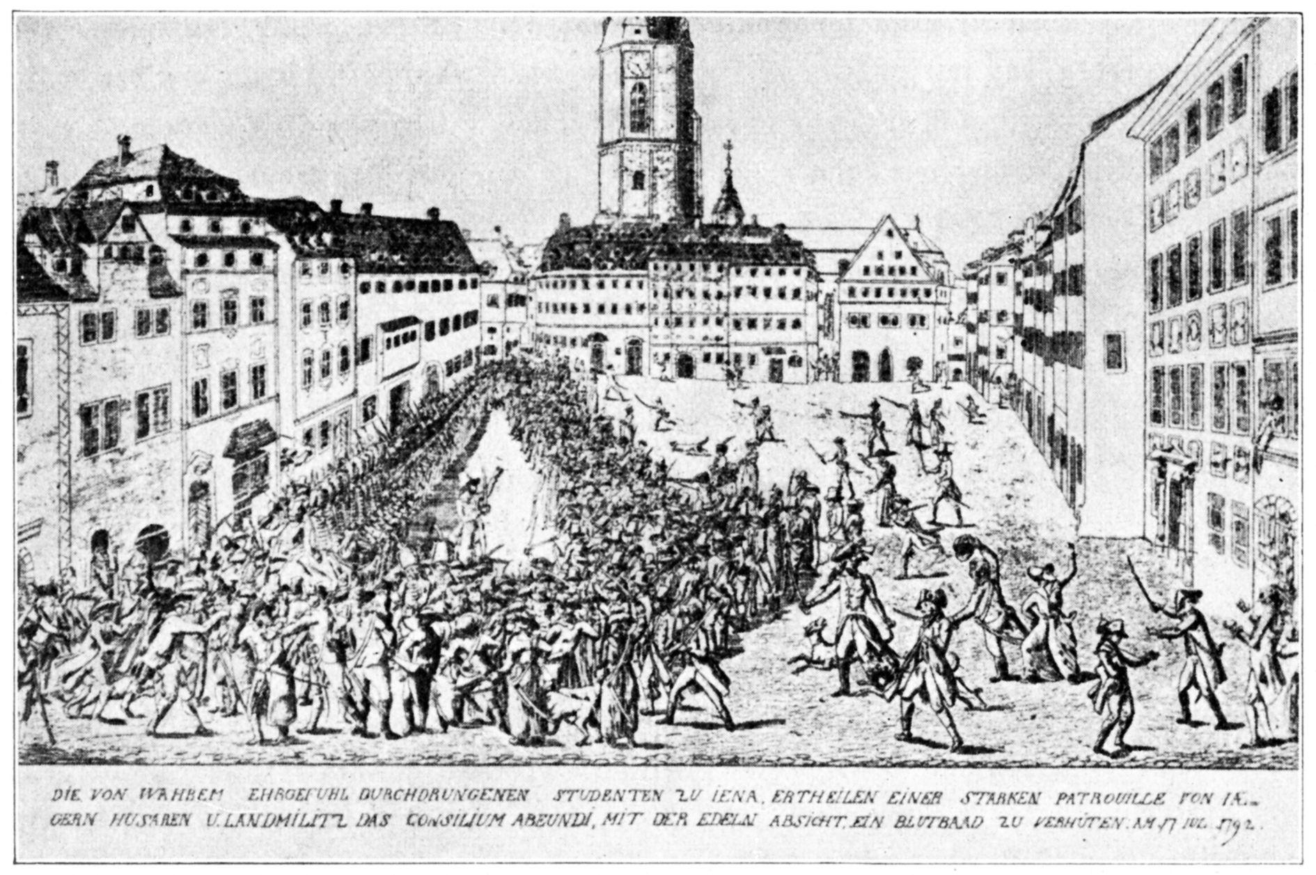 Bewaffnete Tumulte zwischen Studenten und Soldaten auf dem Jenaer Marktplatz am 17. Juli 1792 infolge der Schokoladisten-Unruhen. Unterschrift: Die von wahrem Ehrgefühl durchdrungenen Studenten zu Jena, ertheilen einer starken Patrouille von Iegern Husaren u. Landmiliz das consilium abeundi, mit der edeln Absicht, ein Blutbad zu verhüten am 17. Jul. 1792.